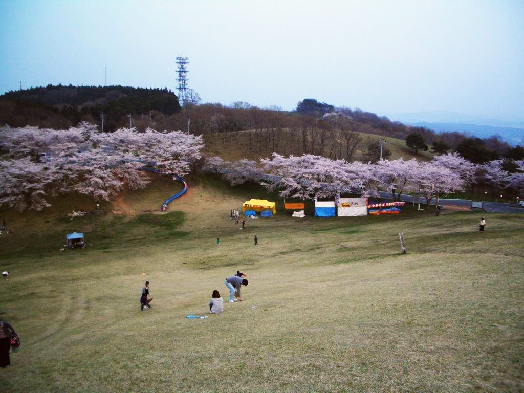 加護坊さくらまつり